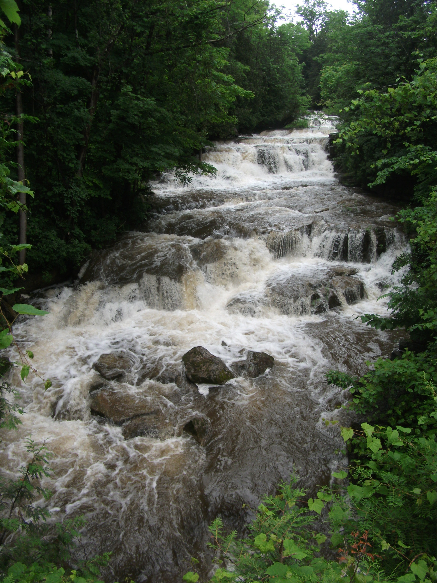 Stockbridge Falls - Munnsville, New York